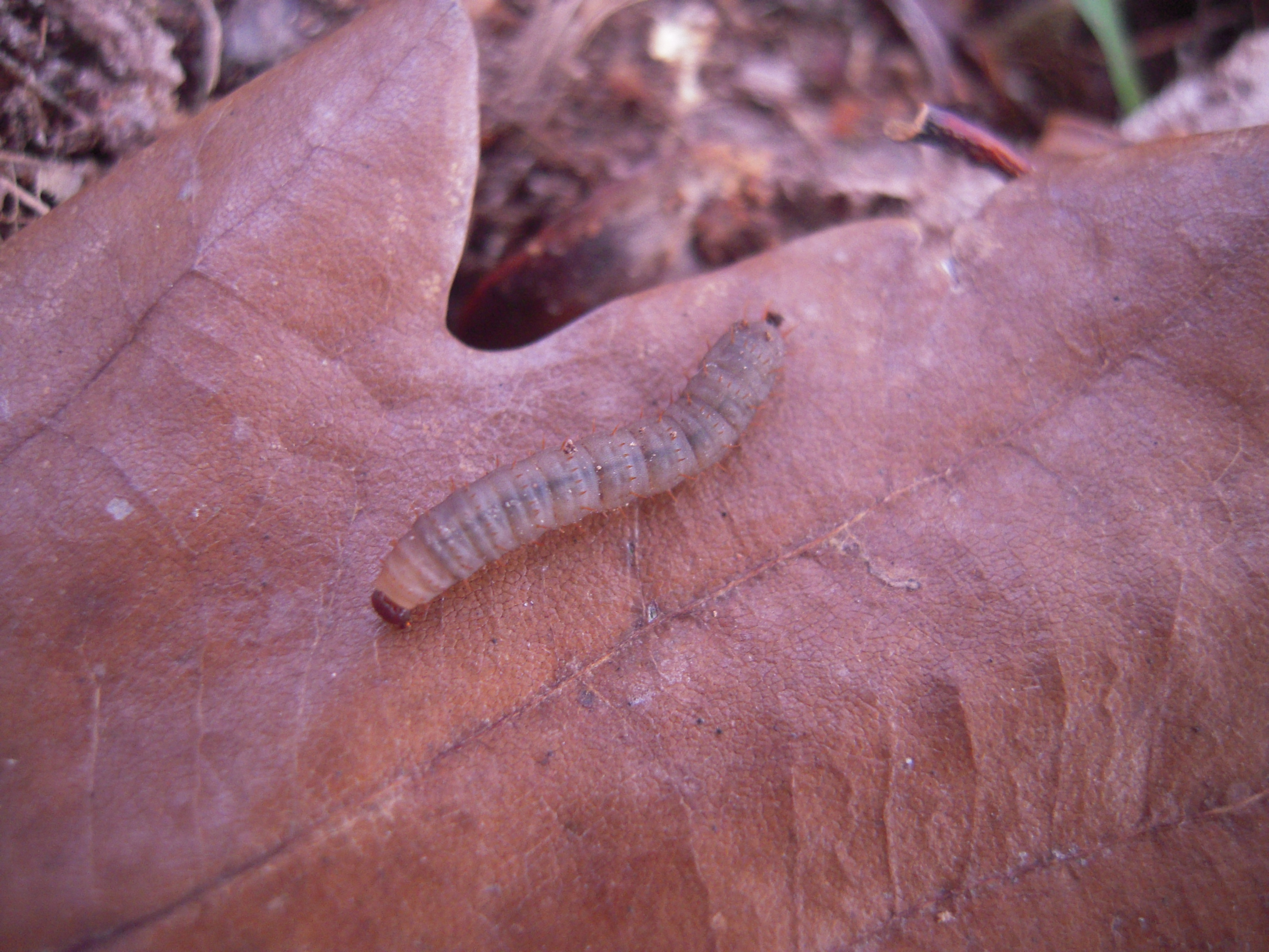 Bibio sp.